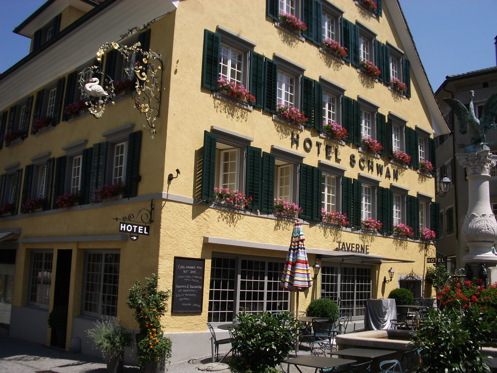 Horgen ZH, Switzerland self-made, July 2006